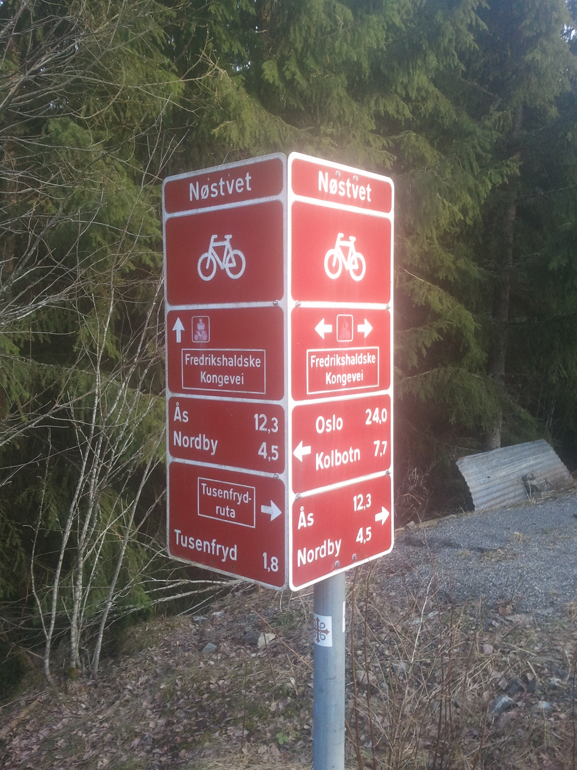 Veiskilt langs den Fredrikshaldske kongevei ved Nøstvet i Ås.